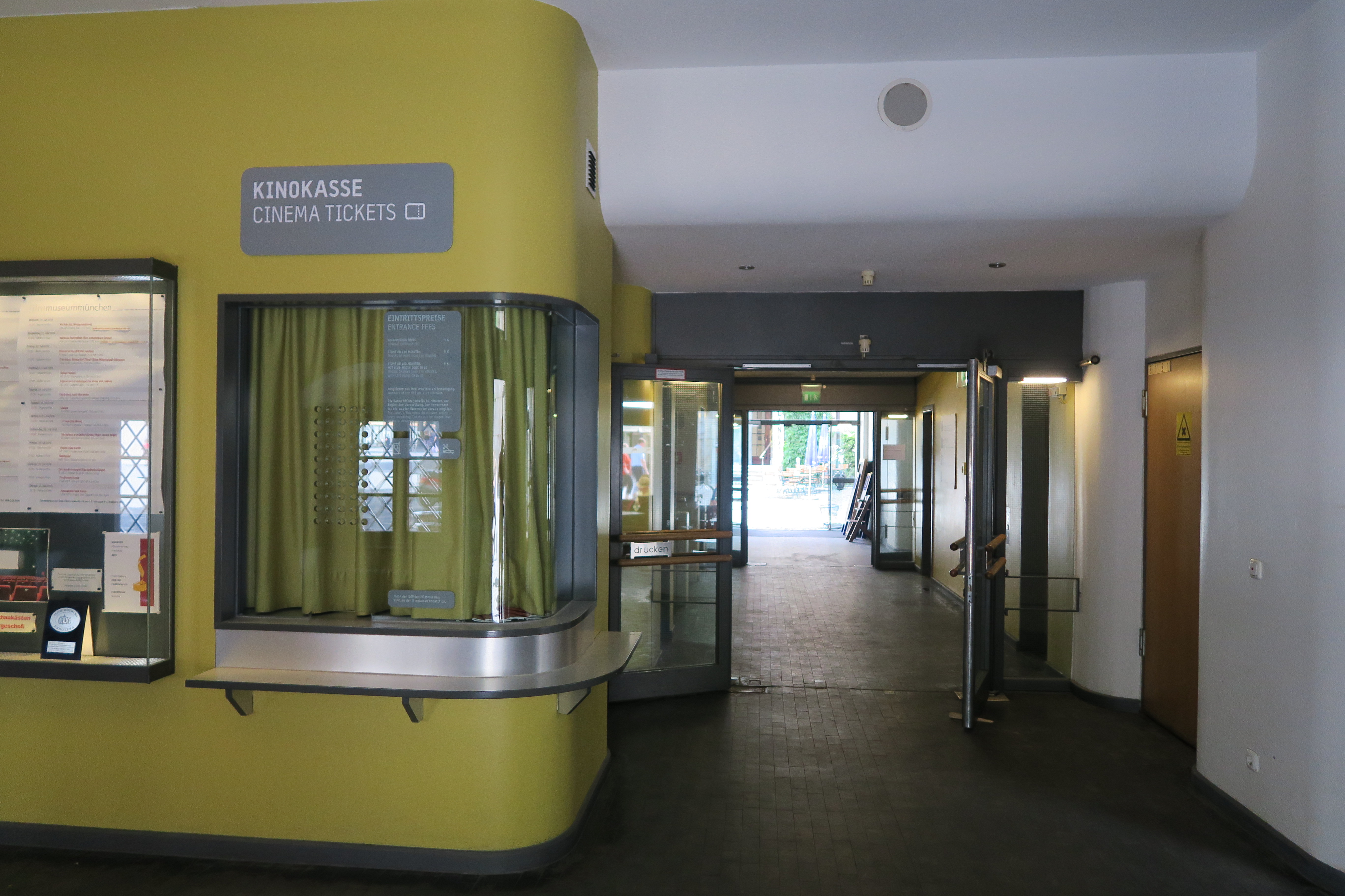 Blick in das Filmmuseum München am St.-Jakobs-Platz